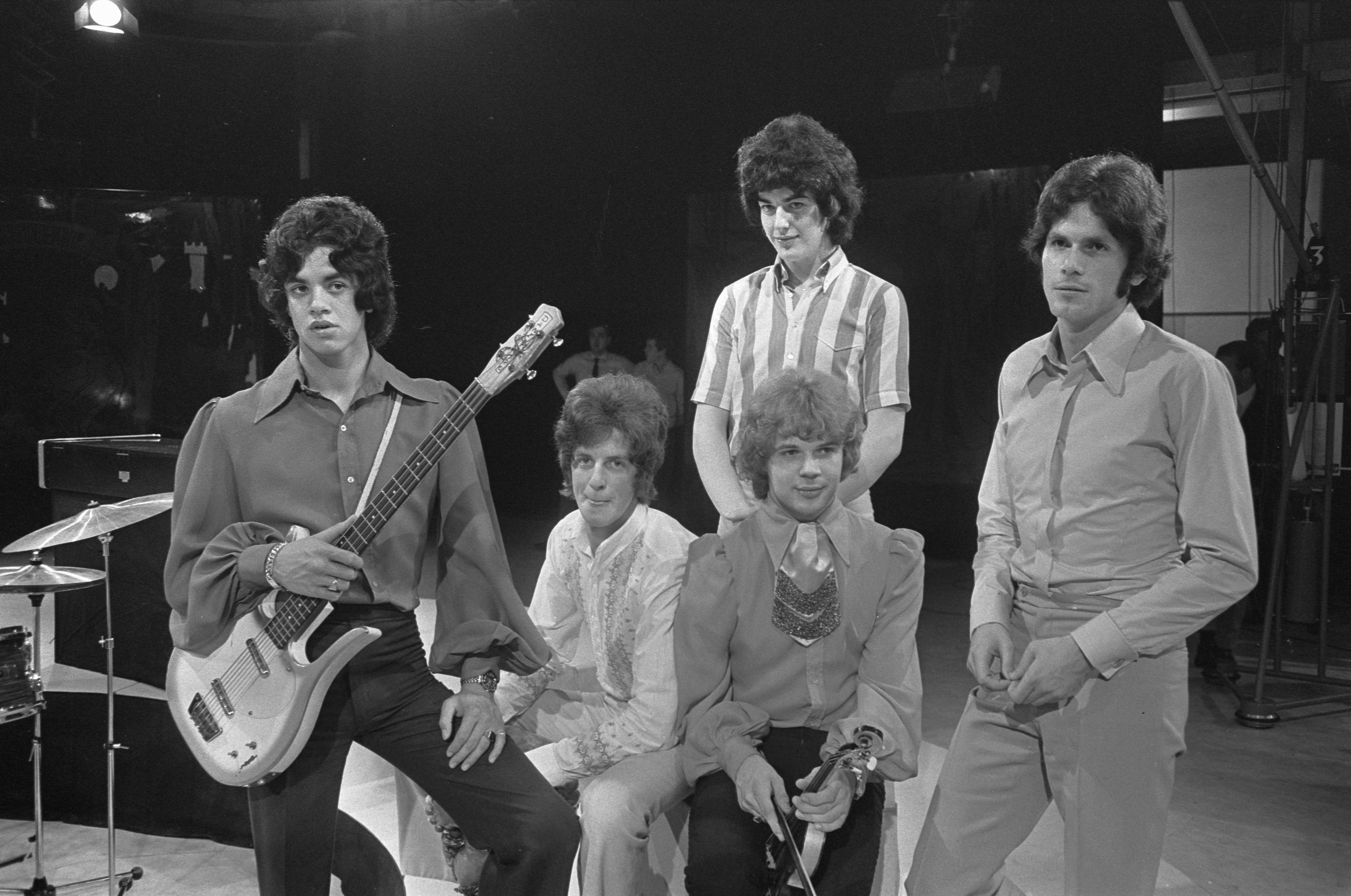 Collectie / Archief : Fotocollectie Anefo Reportage / Serie : VARA TV programma's Beschrijving : TV programma '...Puntje, puntje, puntje...'. Popgroep Tee Set Annotatie : Band bestaat dan uit vlnr. Franklin Madjid, Joop Blom, Ferdi Karmelk, Peter Tetteroo (zittend),en toetsenist Peter Sellberger? Datum : 13 augustus 1968 Trefwoorden : bands, groepsportretten, televisieprogramma's, televisieprogramma's Instellingsnaam : VARA Fotograaf : Fotograaf Onbekend / Anefo Auteursrechthebbende : Nationaal Archief Materiaalsoort : Negatief (zwart/wit) Nummer archiefinventaris : bekijk toegang 2.24.01.05 Bestanddeelnummer : 921-5933